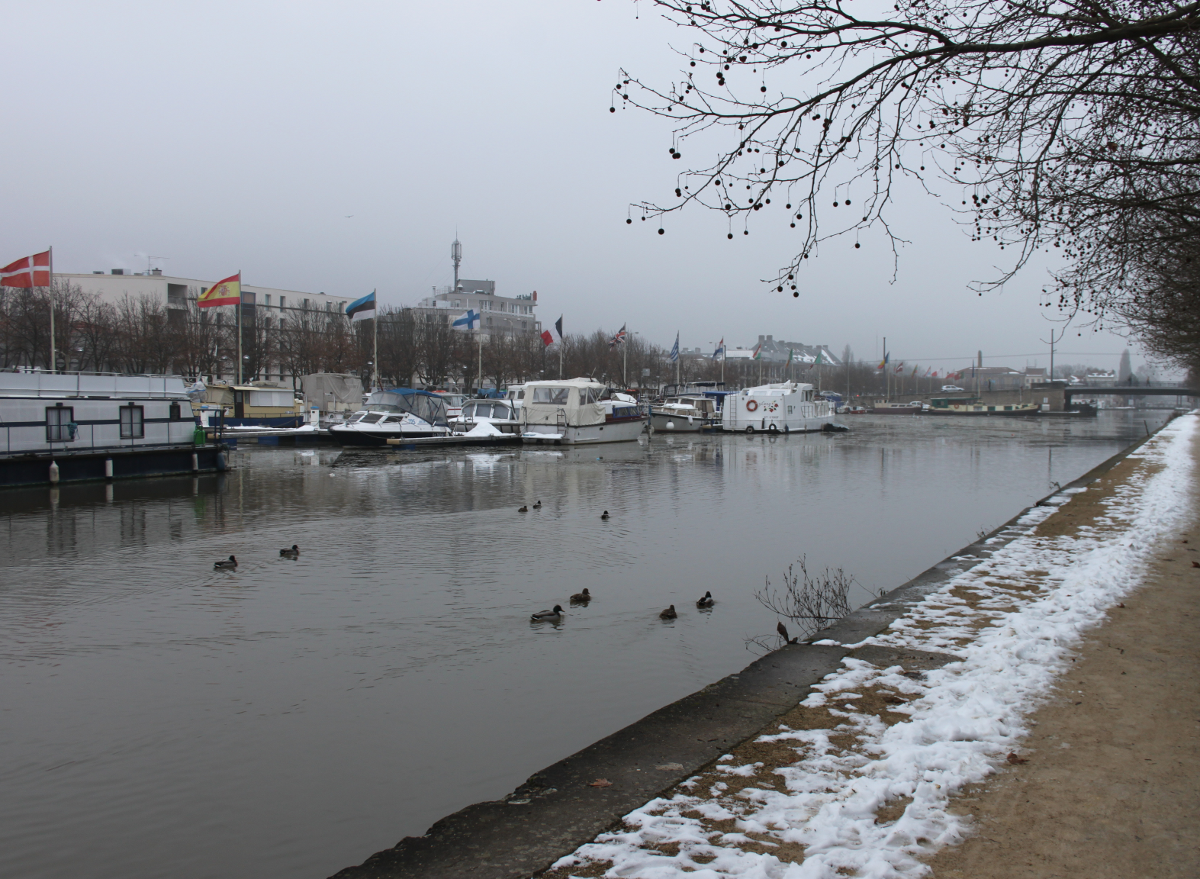 Port de Nancy, vue depuis la promenade de Kanazawa, décembre 2010